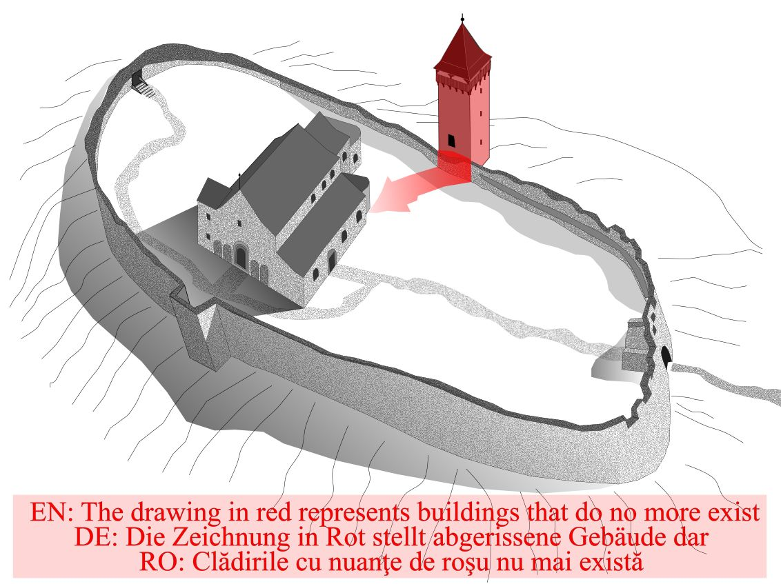 Biserica fortificata din Cisnadioara